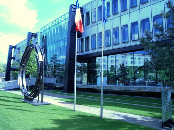 Ambasada Francji w Warszawie